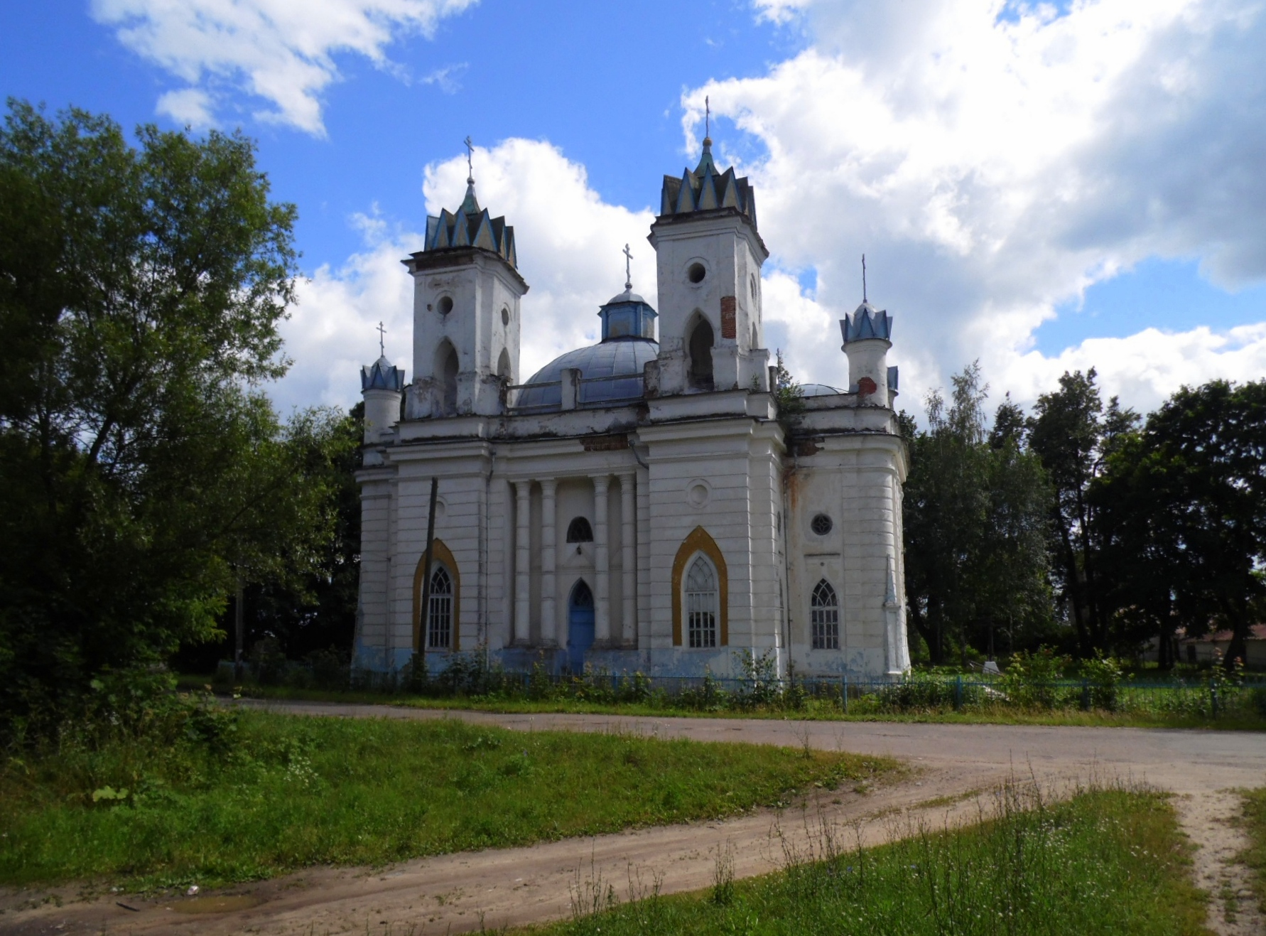 Церковь Преображения Господня (Преображенская) (Брянская область, Клинцы, село Великая Топаль)